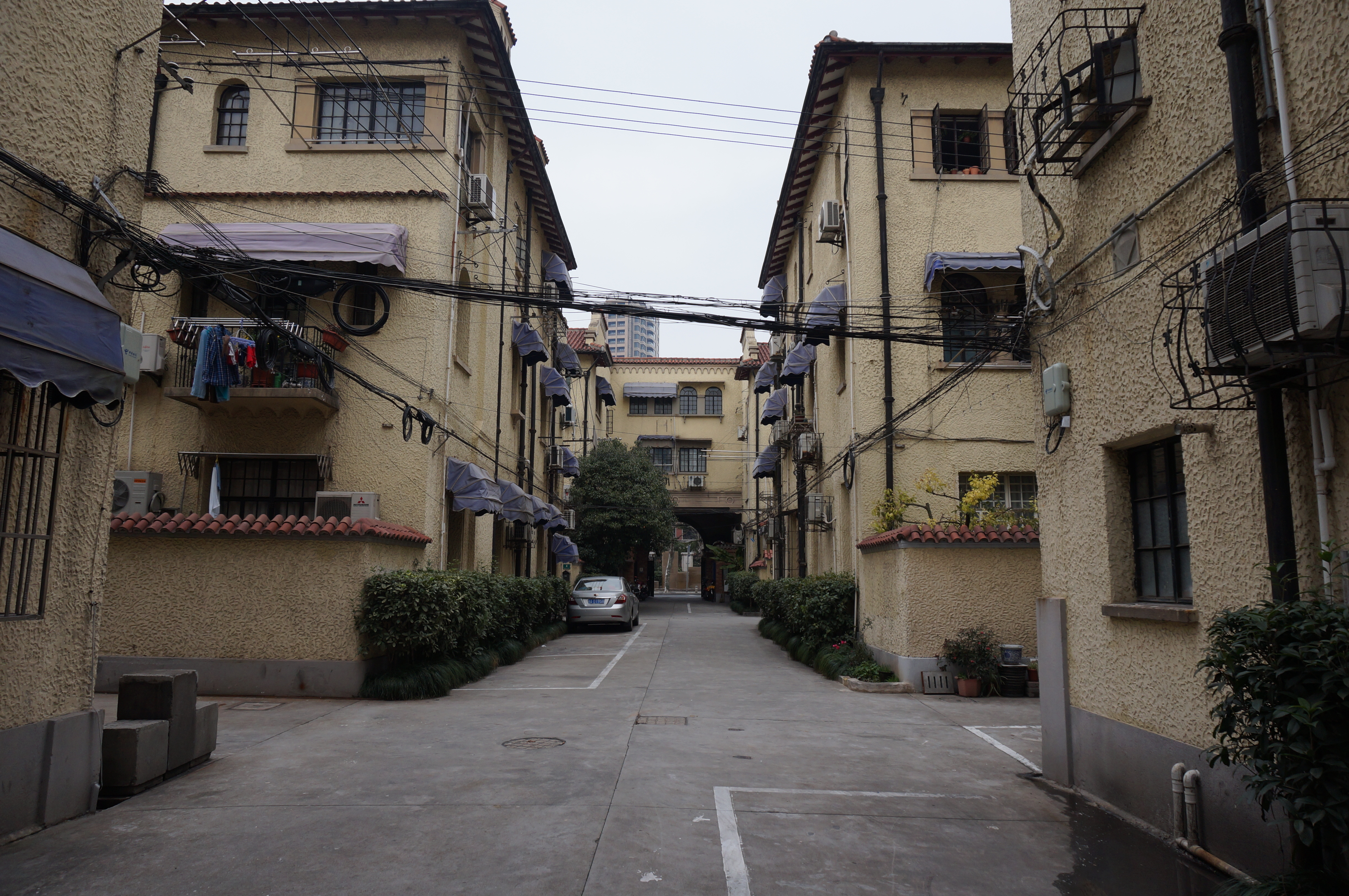 上海涌泉坊的总弄